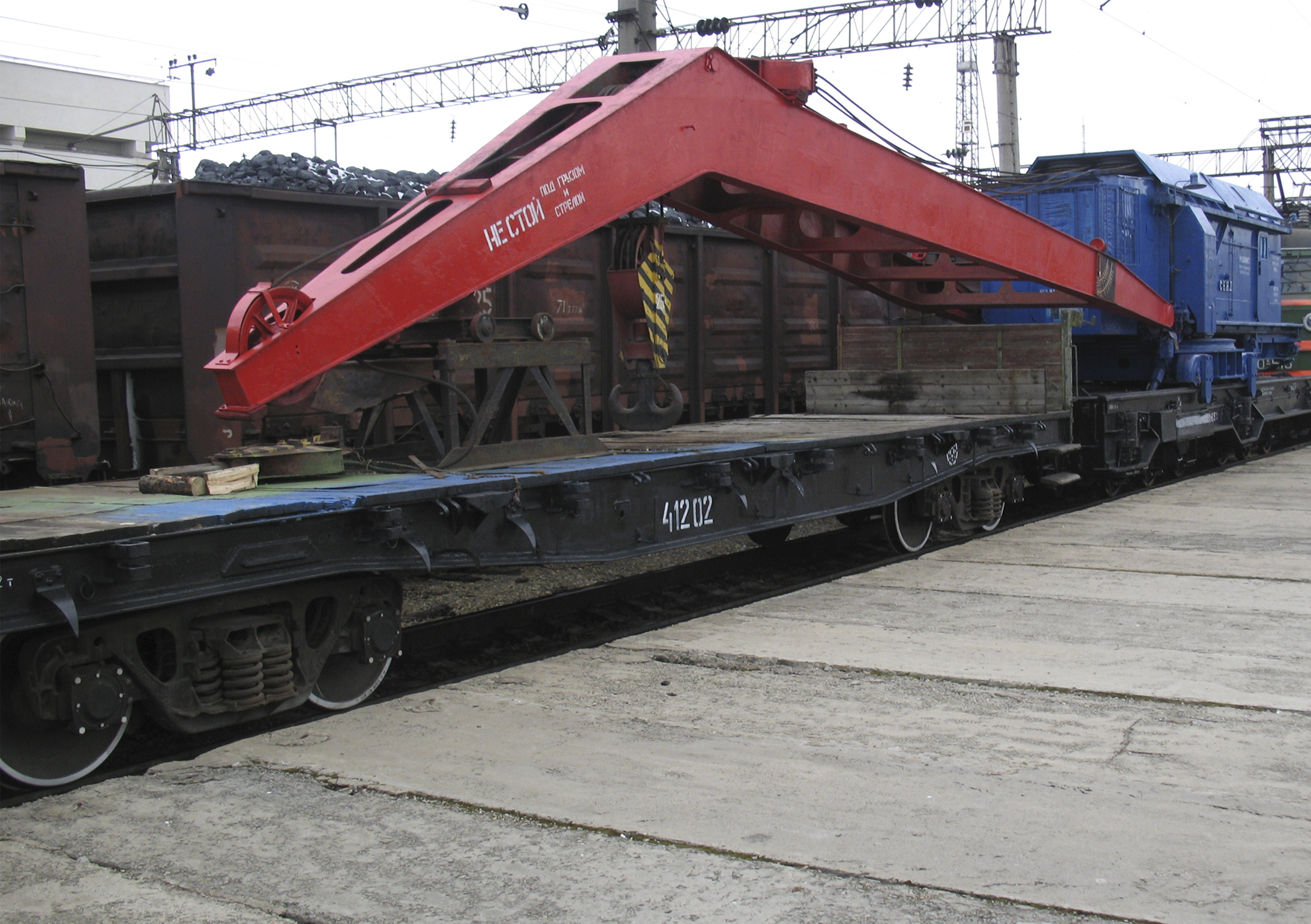 Кран построен в 1952 заводом «Унру и Либиг», ГДР